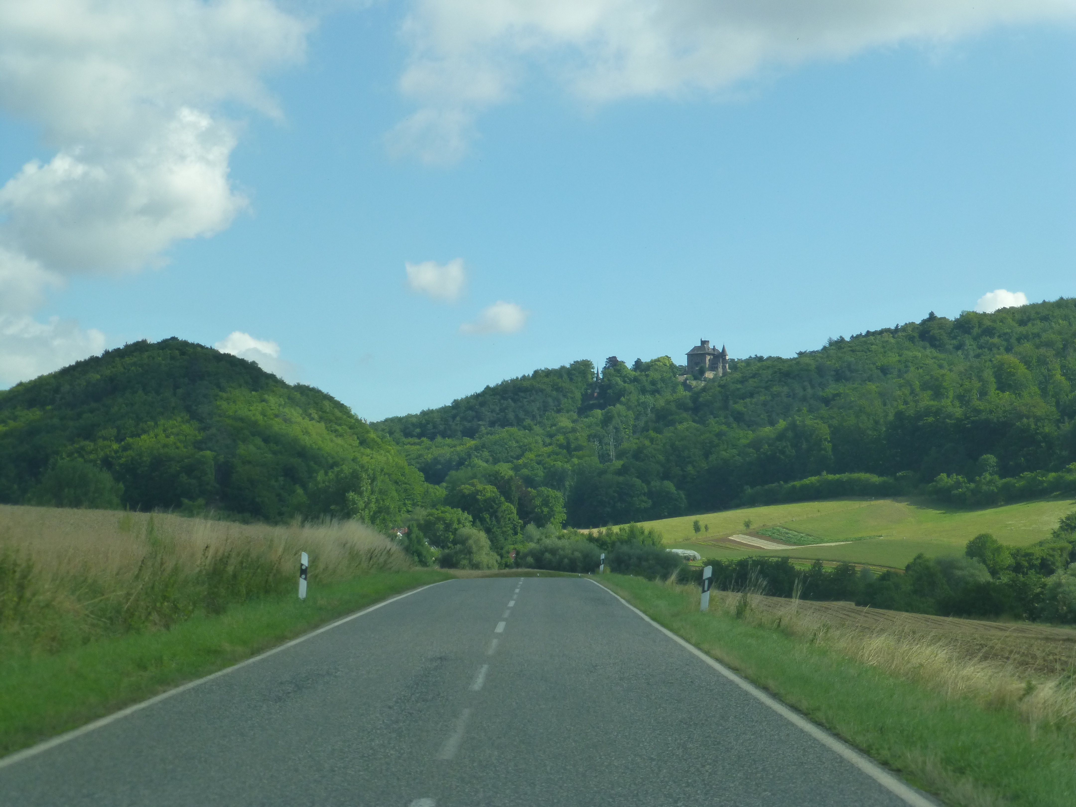 Blick über das Hübental auf Schloss Berlepsch von Süden (links der Große Hübenberg)